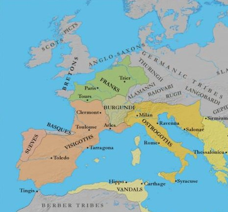 West Germanic kingdoms (460AD)